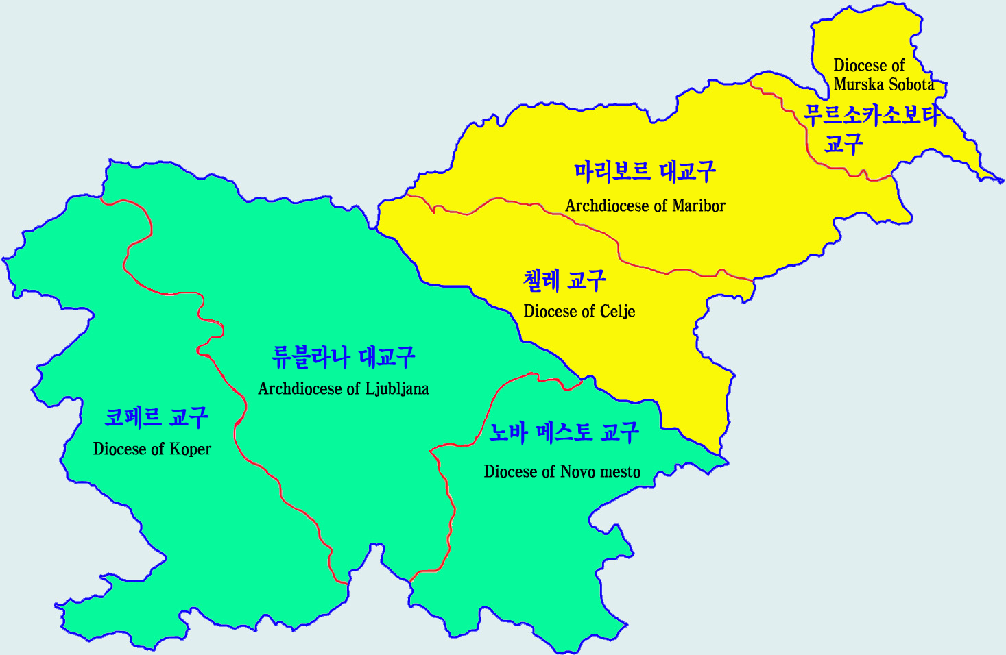 슬로베니아 로마가톨릭교구도